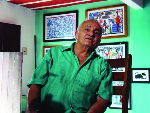 Xilogravurista e cordelista brasileiro J. Borges em imagem do acervo da TV Brasil.